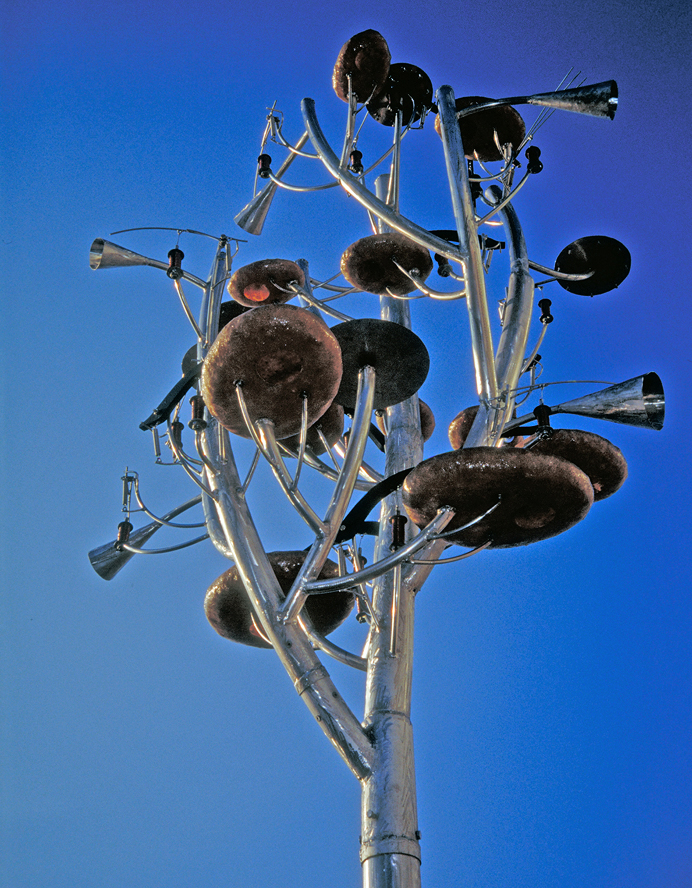 Jan Cardells verk Ktree utanför Malmö Högskola 2000.